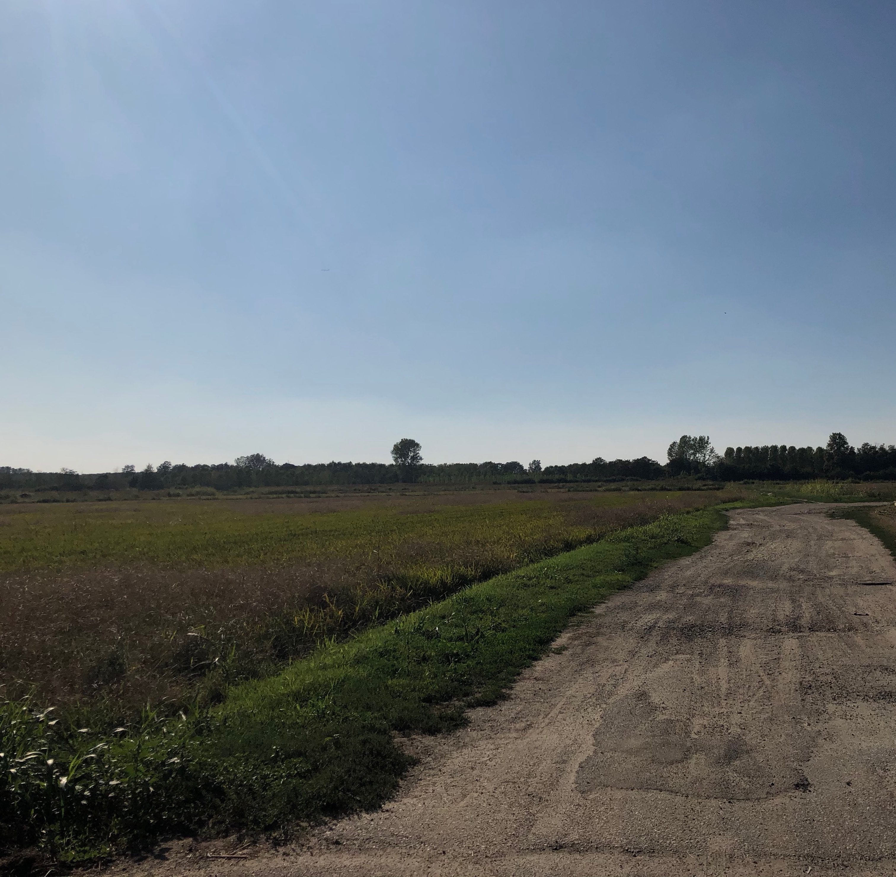 Immagine con bosco di castagni in lontananza e una strada affiancata ad un campo di riso in primo piano